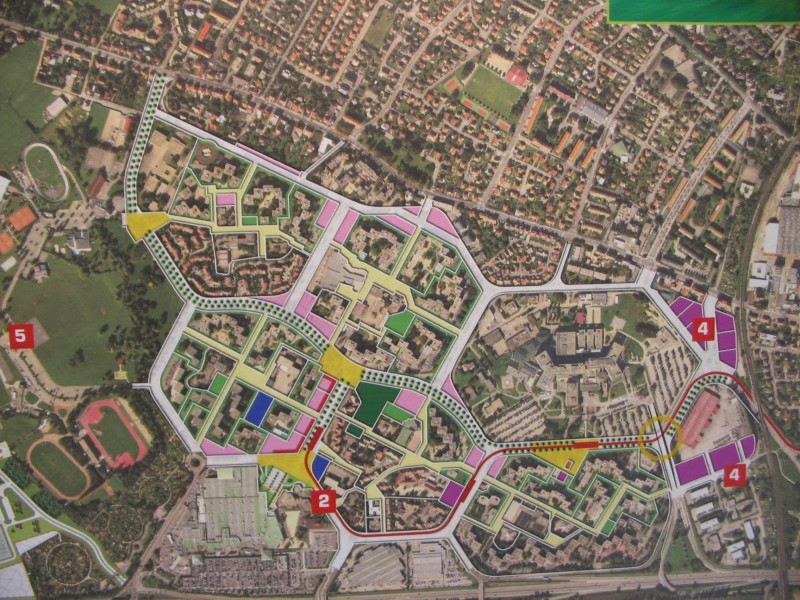 Hautepierre - projet ANRU - d'après l'exposition publique de septembre 2006